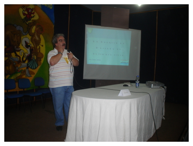 Júlio Neves dando palestra na Terceira Semana de Software Livre da UNIRIO.